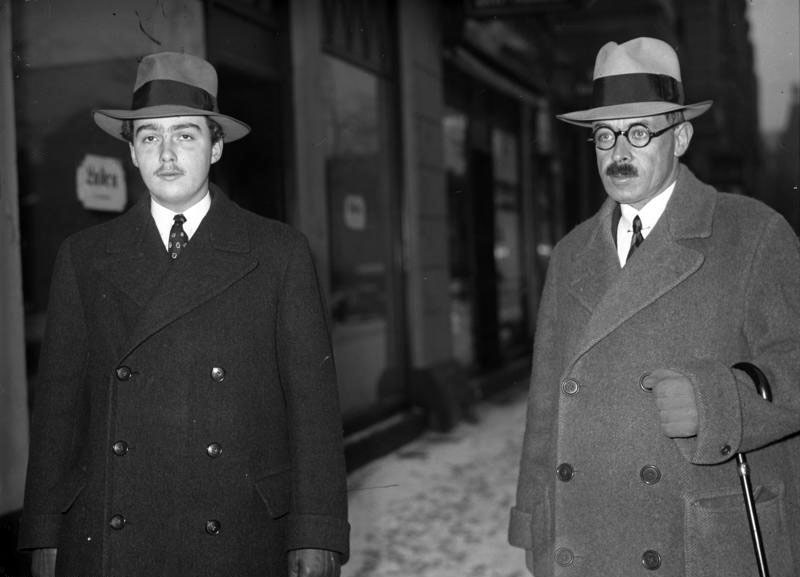 Otto von Habsburg als Student in Berlin! Otto von Habsburg, der älteste Sohn des letzten Kaisers von Österreich Karl von Habsburg, der Thronanwärter auf die Ungarische-Königskrone, weilt als Student an der Berliner Universität (links). Rechts sein Betreuer Graf von Degenfeld